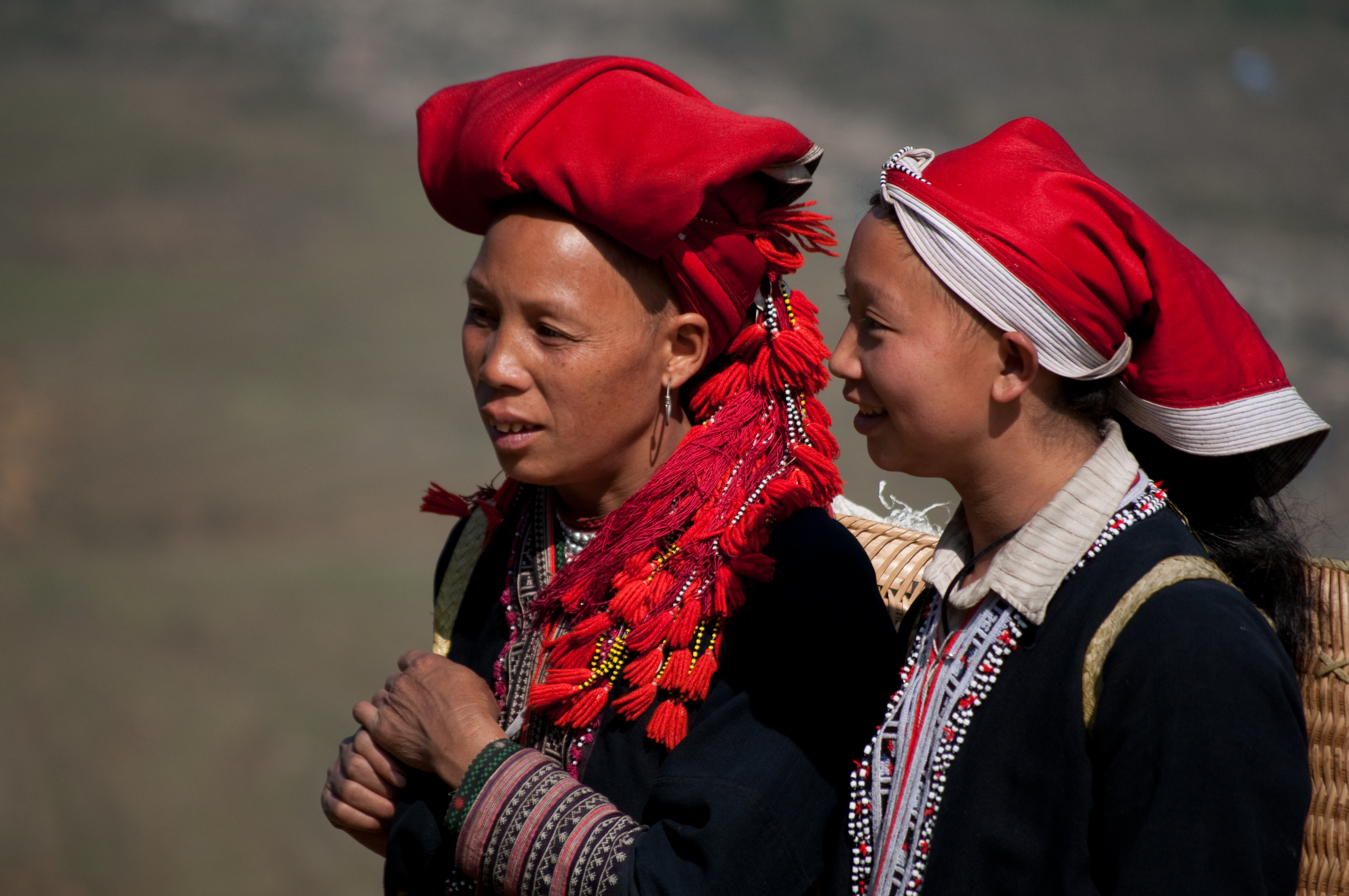 Yao people, Sa Pa, Vietnam